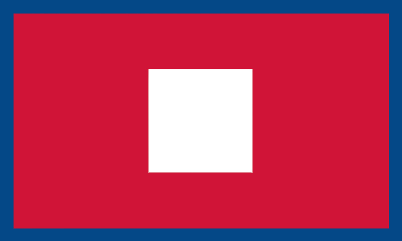 Bonnie Prince Charlie's banner